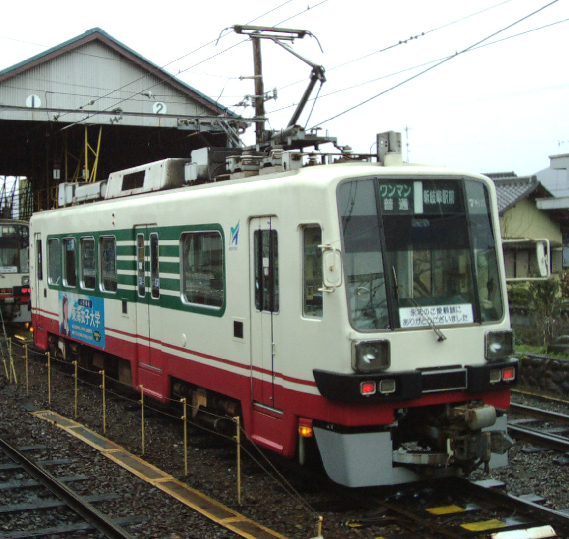 モ780形電車788